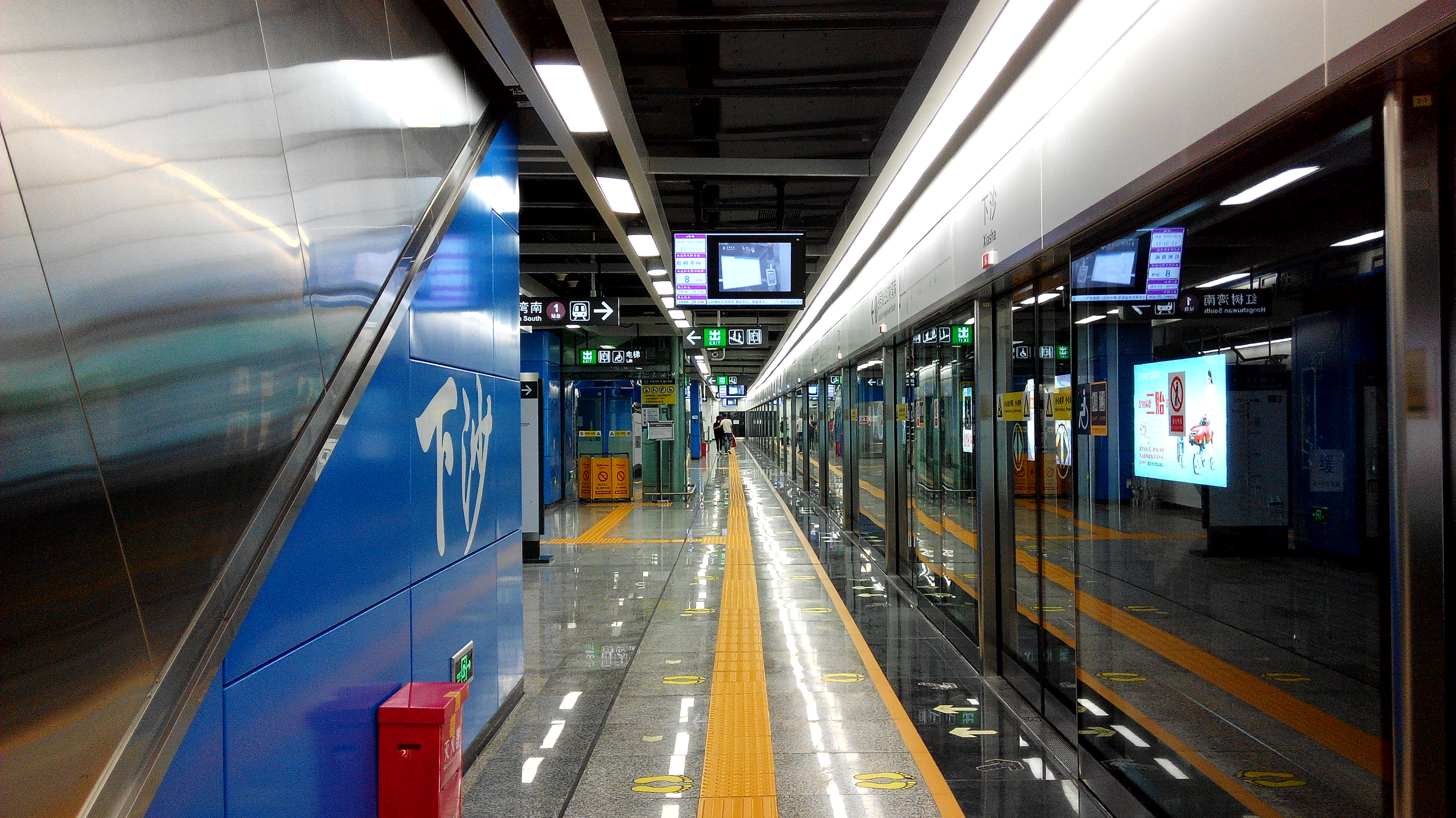 深圳地铁9号线 下沙站1号站台